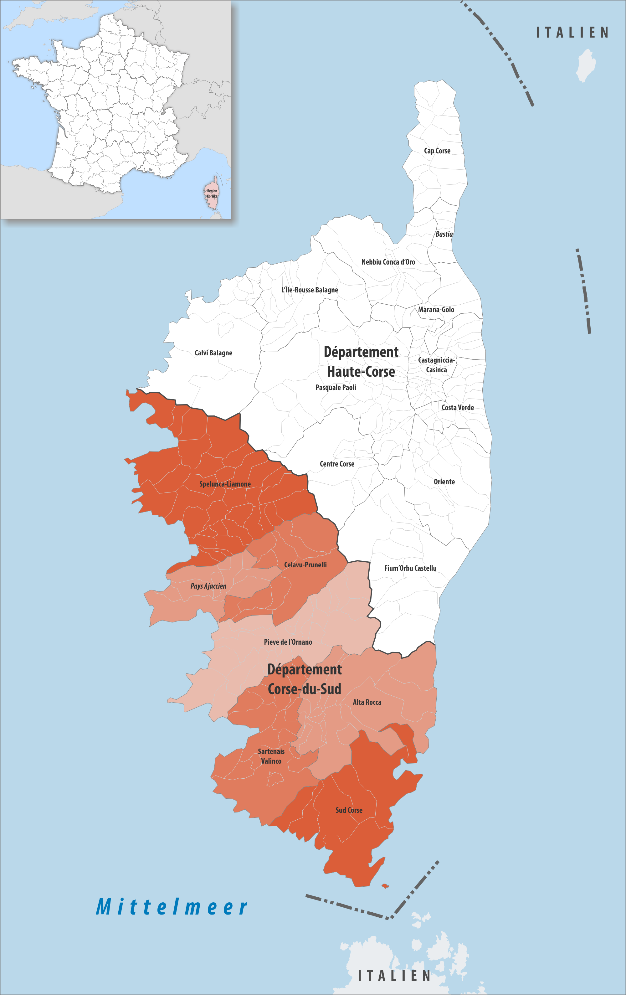 Gemeindeverbände im Département Corse-du-Sud